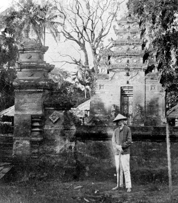 Negatief. Dr. H.N. van der Tuuk op een tempelcomplex in Soekasade